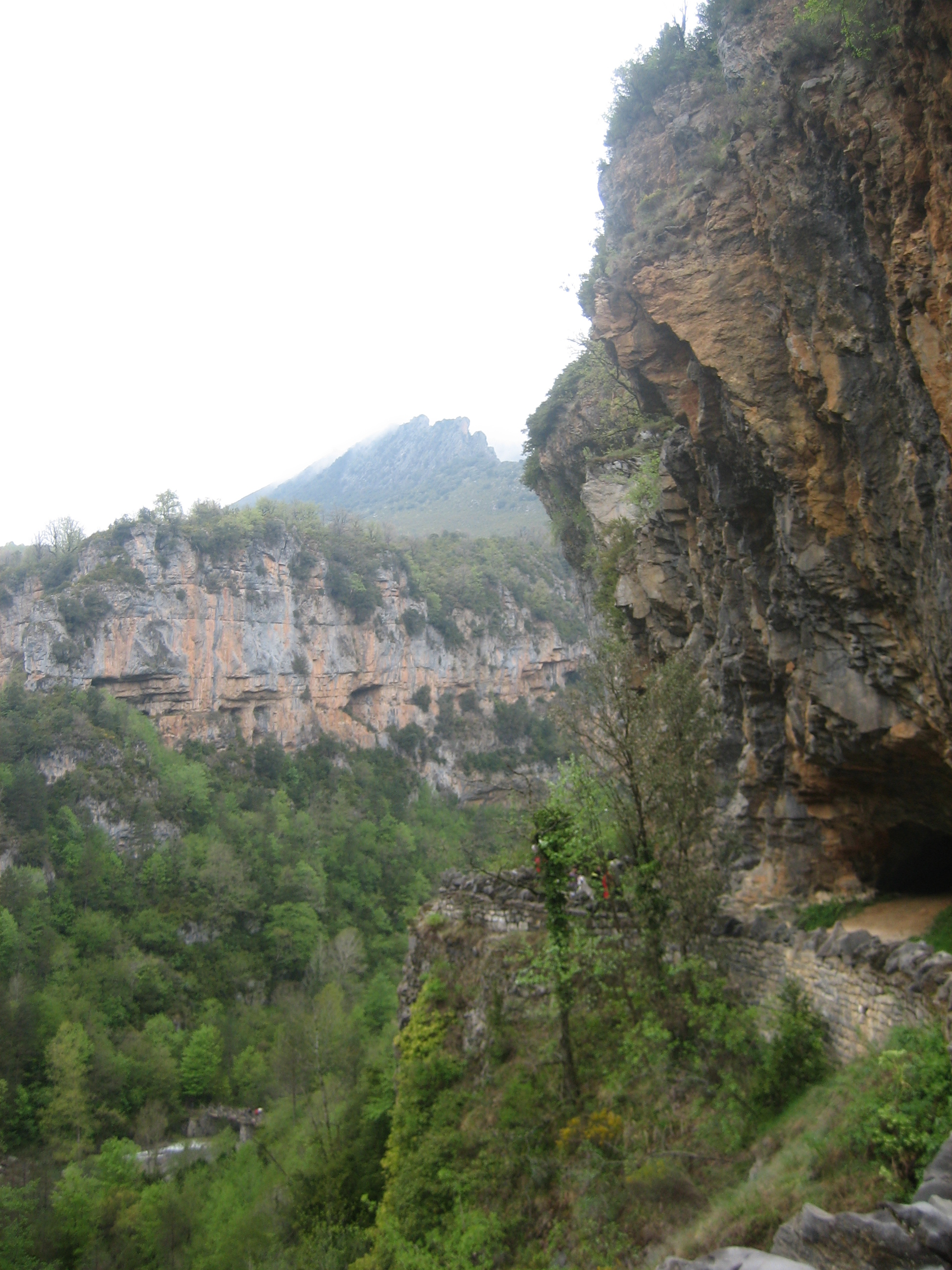 Cañón del Añisclo This is a photography of a Site of Community Importance in Spain with the ID: ES0000016. Natura2000 entry, EEA entry